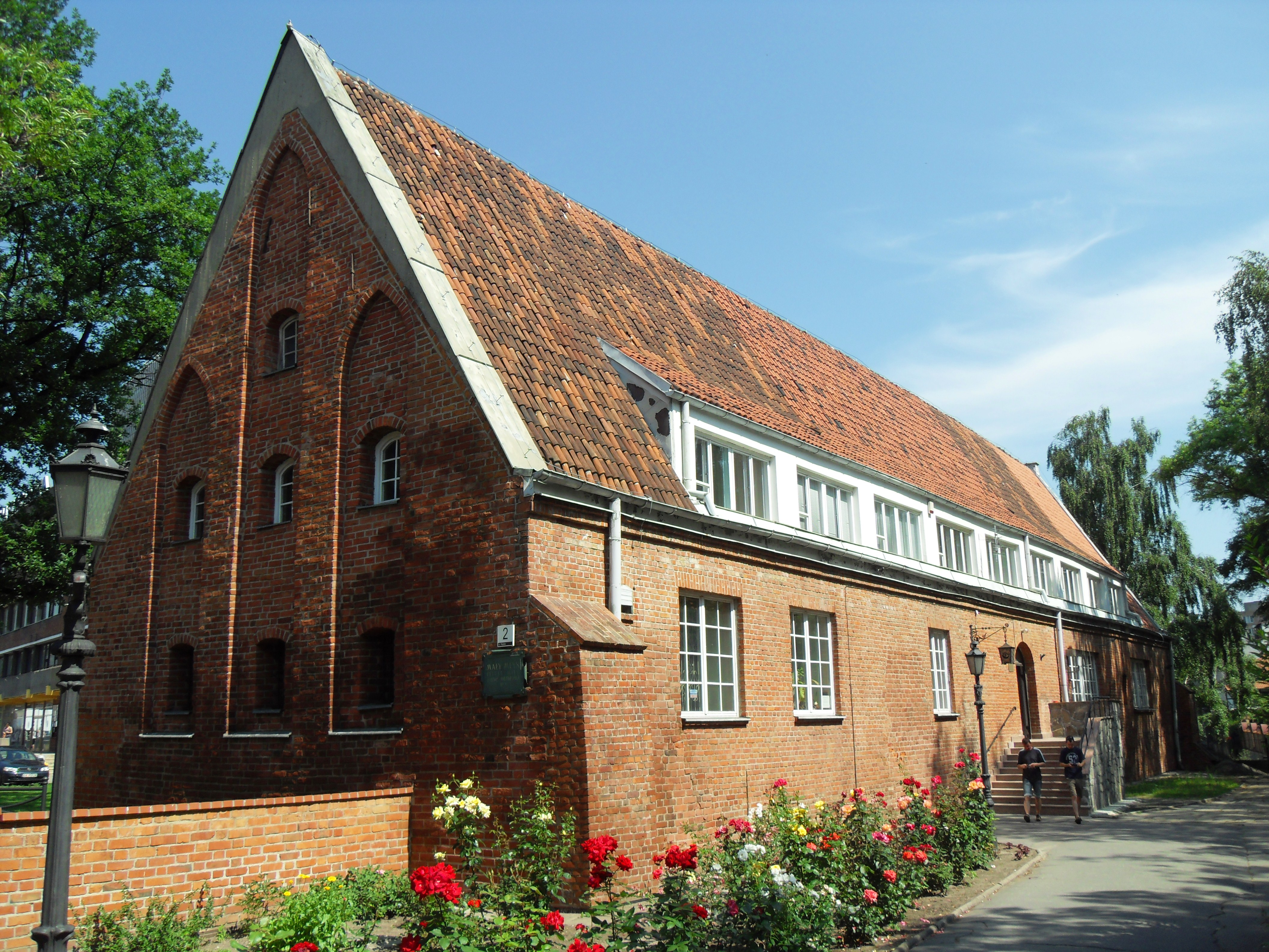 Gdańsk Stare Miasto, ul. Rajska 2 - Młyn Mały, obecnie Polski Związek Wędkarski, kon. XIV, po 1964